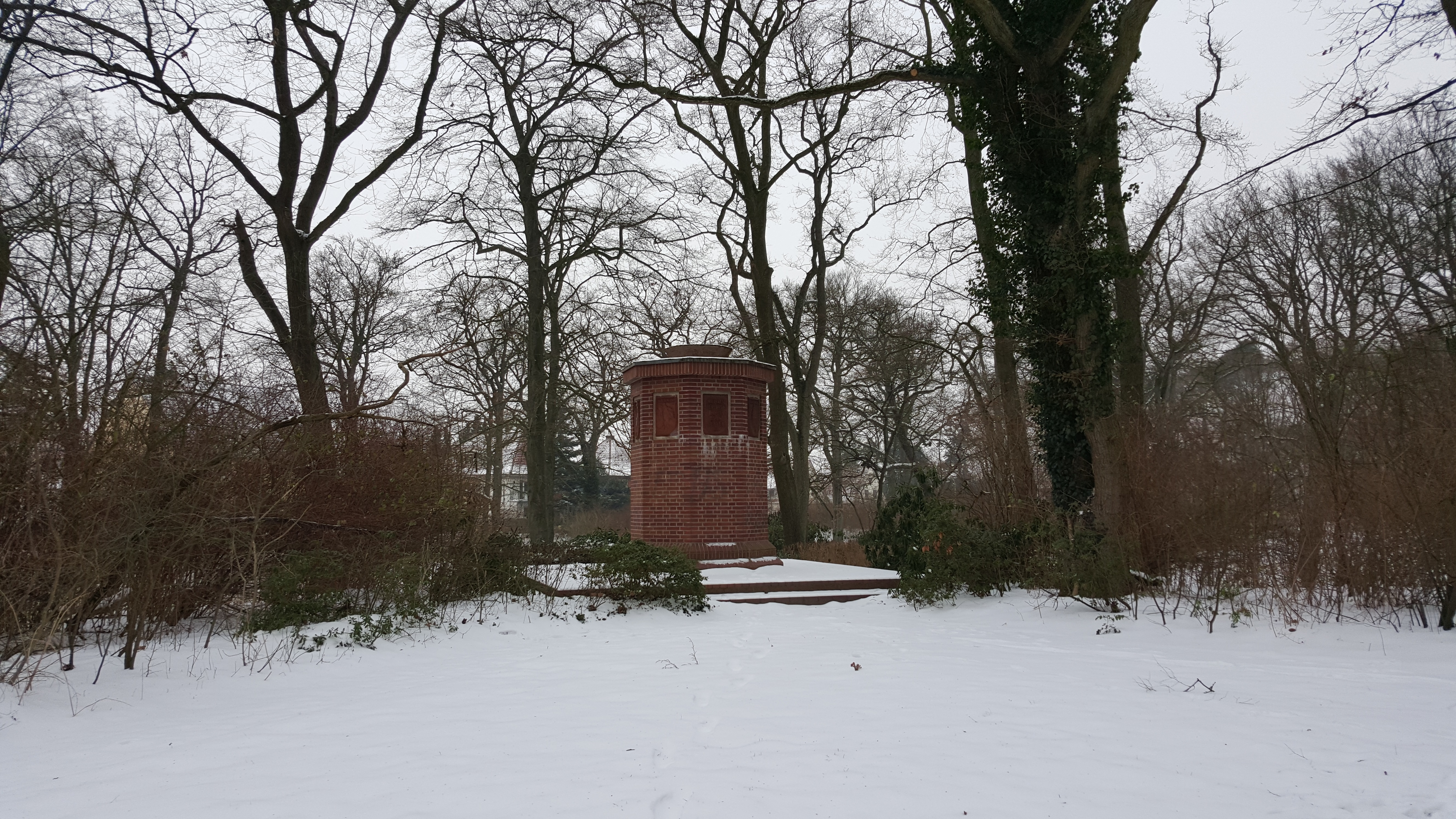 Mahnmal der Heimatvertriebenen im Bürgerpark von Verden. An der Vorderseite steht die Inschrift NIEMALS VERLOREN IMMER DRAN DENKEN. Die Seiten tragen die Wappen von Brandenburg, Danzig, Schlesien, Ostpreußen, Westpreußen, Pommern und dem Sudetenland.